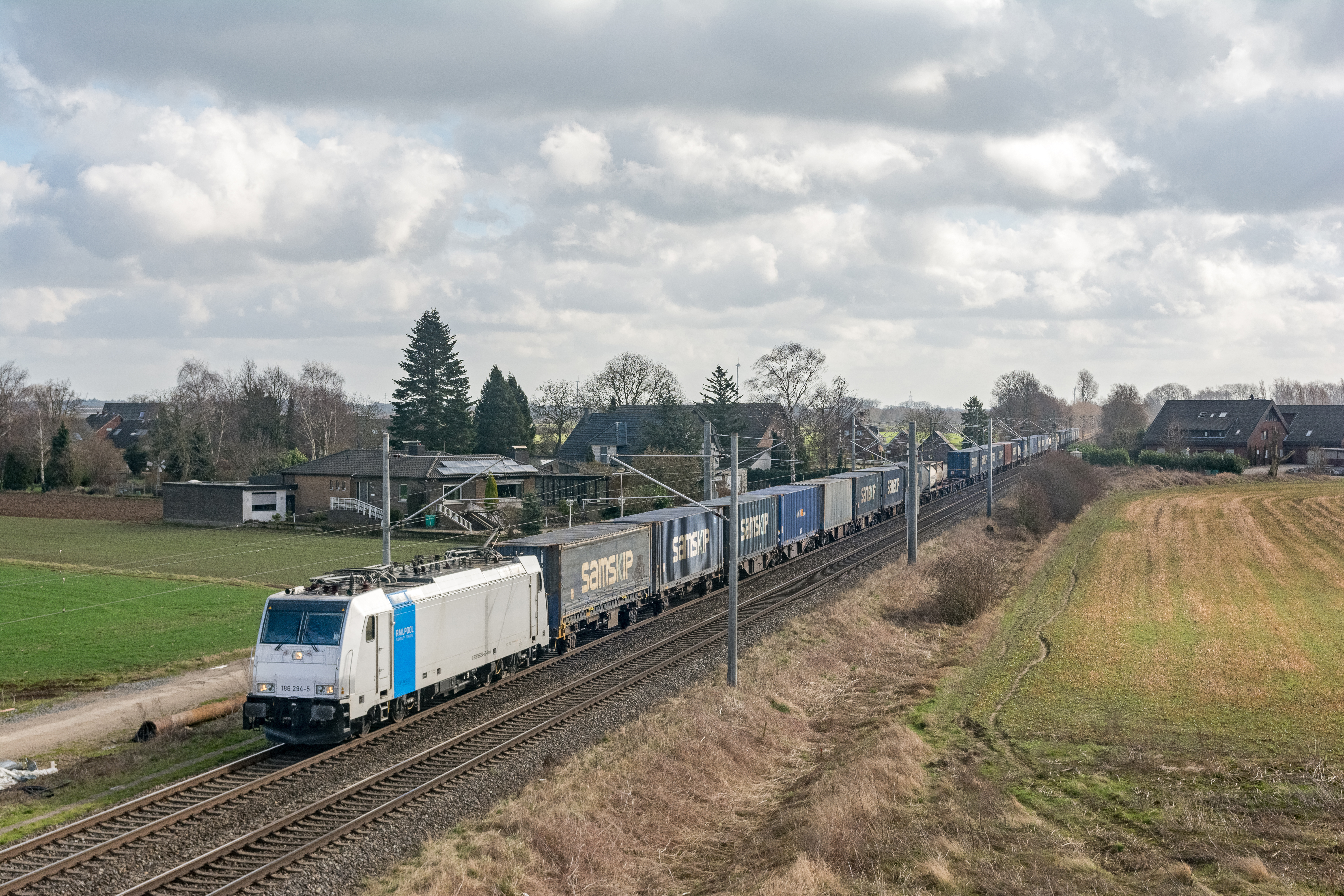 Captrain 186 294 komt vanaf het Ruhrgebied met een Melzo Shuttle, met voornamelijk Samskip containers, richting Rotterdam.